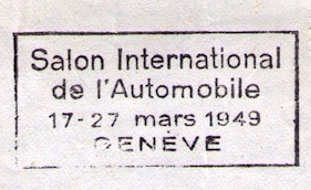 Flamme postale publicitaire sur une enveloppe envoyée de Genève (Cachet postal) : publicité pour le Salon internationale de l'automobile 17-27 mars 1949.